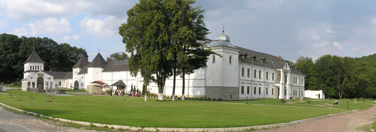 Univ Lavra in Lviv Oblast